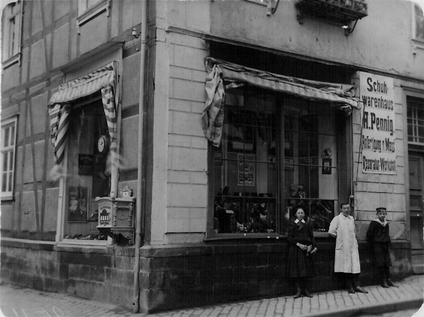 Warburg, Marktstraße 18, Foto um 1900 Photograph. Verlag A. Hoffman, Dresden-A, Liliengasse 24